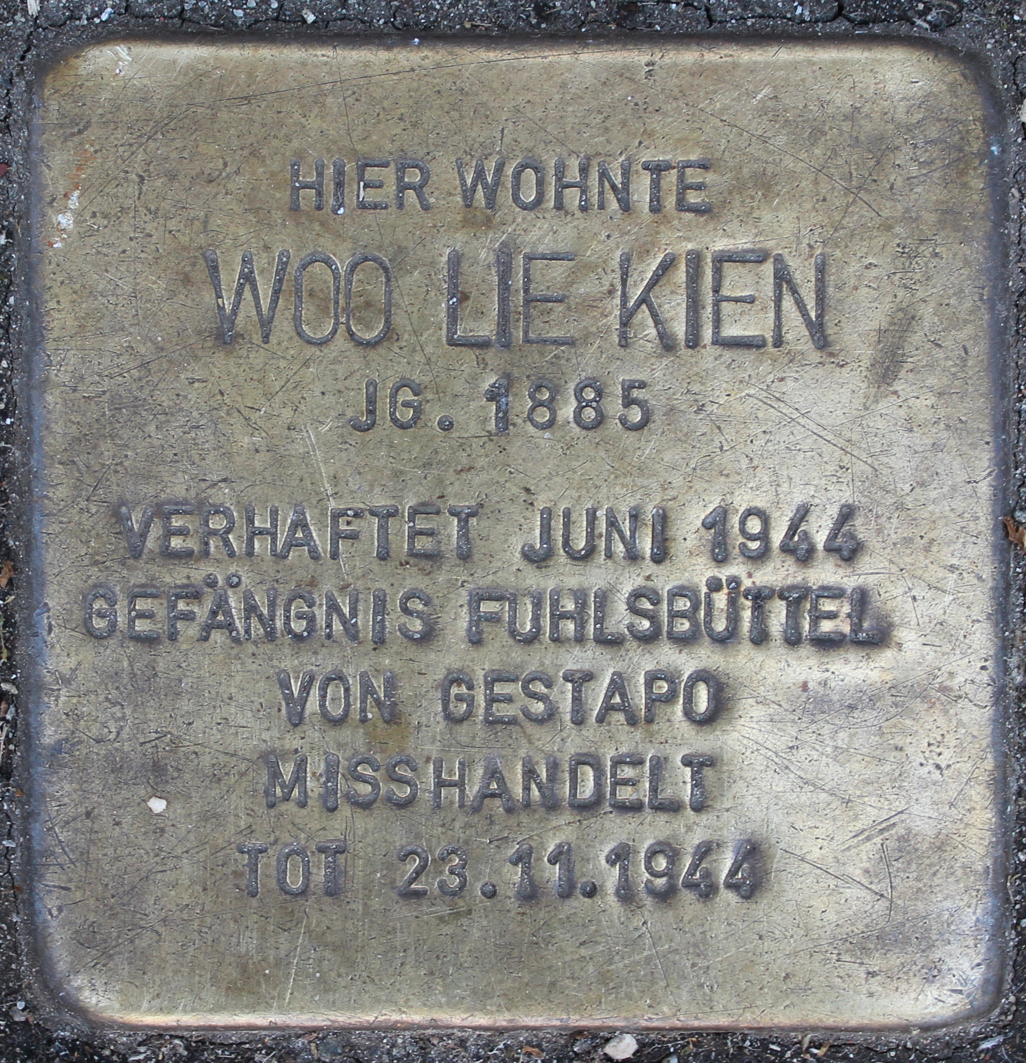 Stolperstein für Woo Lie Kien